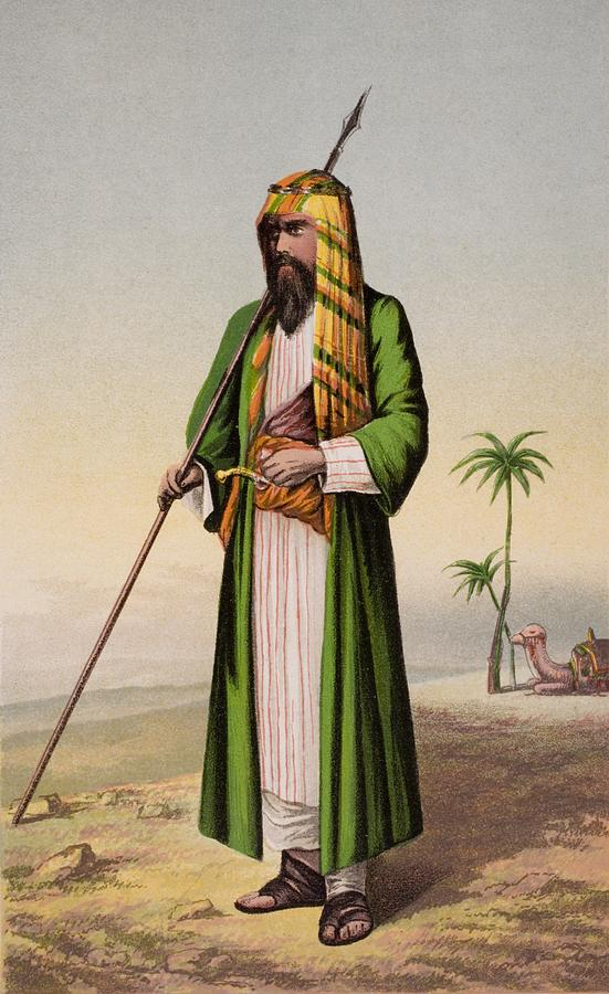 Richard Burton vestido de árabe. Pintura